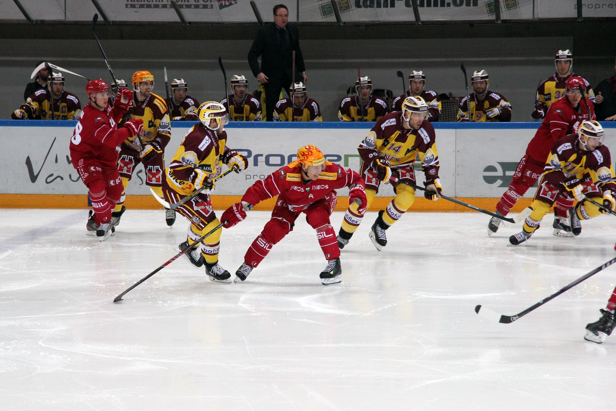 Štefan Ružička (L 28), Daniel Rubin (G 40, TS), Dario Trutmann (G 25), Juha-Pekka Hytönen (L 15, TS), Taylor Pyatt (G 14), John Gobbi (L 43), Tom Pyatt (G 11).